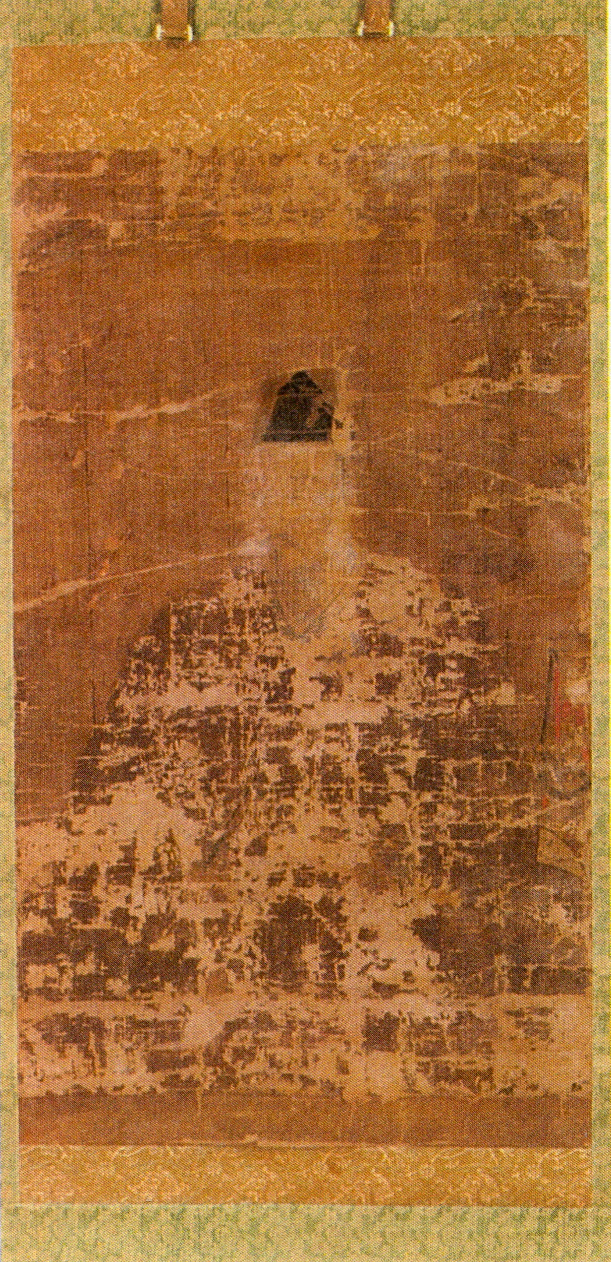 宗貞盛の肖像。